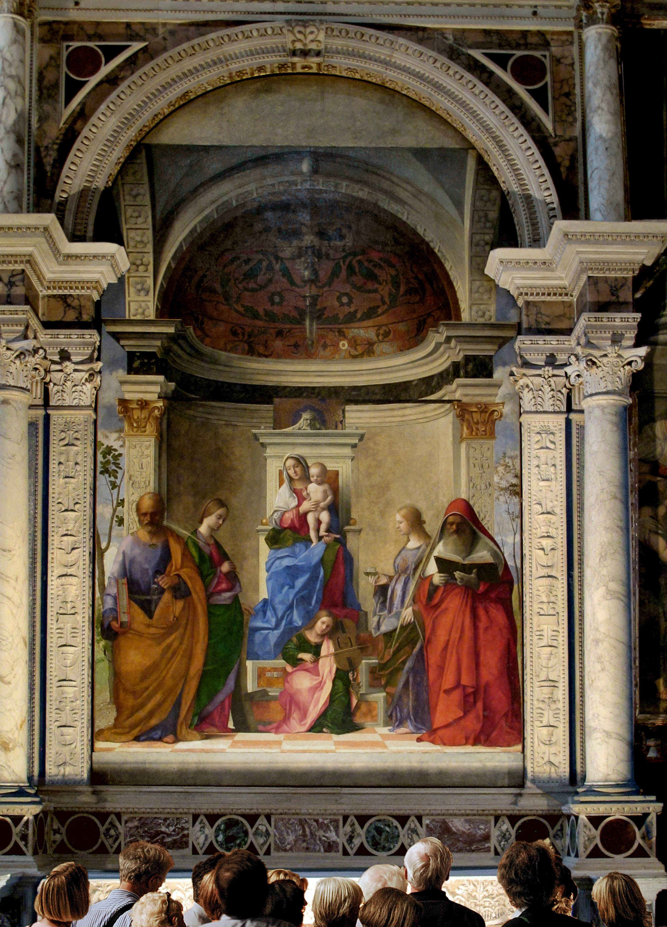 Giovanni Bellini : Retable de San Zaccaria dans le contexte de son autel d'origine. La Vierge et l'Enfant avec quatre saints. Conversation sacrée. À l'origine huile sur panneau de bois (actuellement transposée sur toile), 500 x 235 cm. 1505. Église San Zaccaria, Venise.